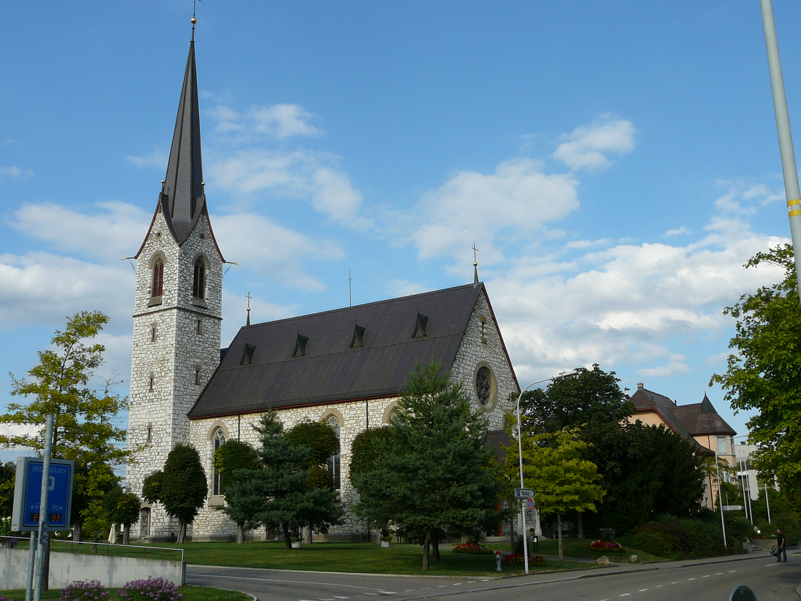 Römisch-katholische Dreifaltigkeitskirche Bülach